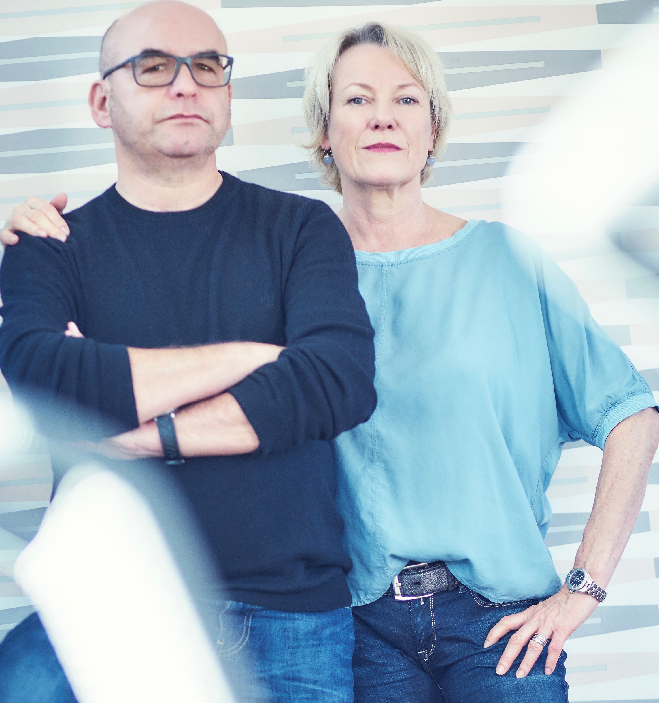 Autoren-Duo Eva und Volker A. Zahn